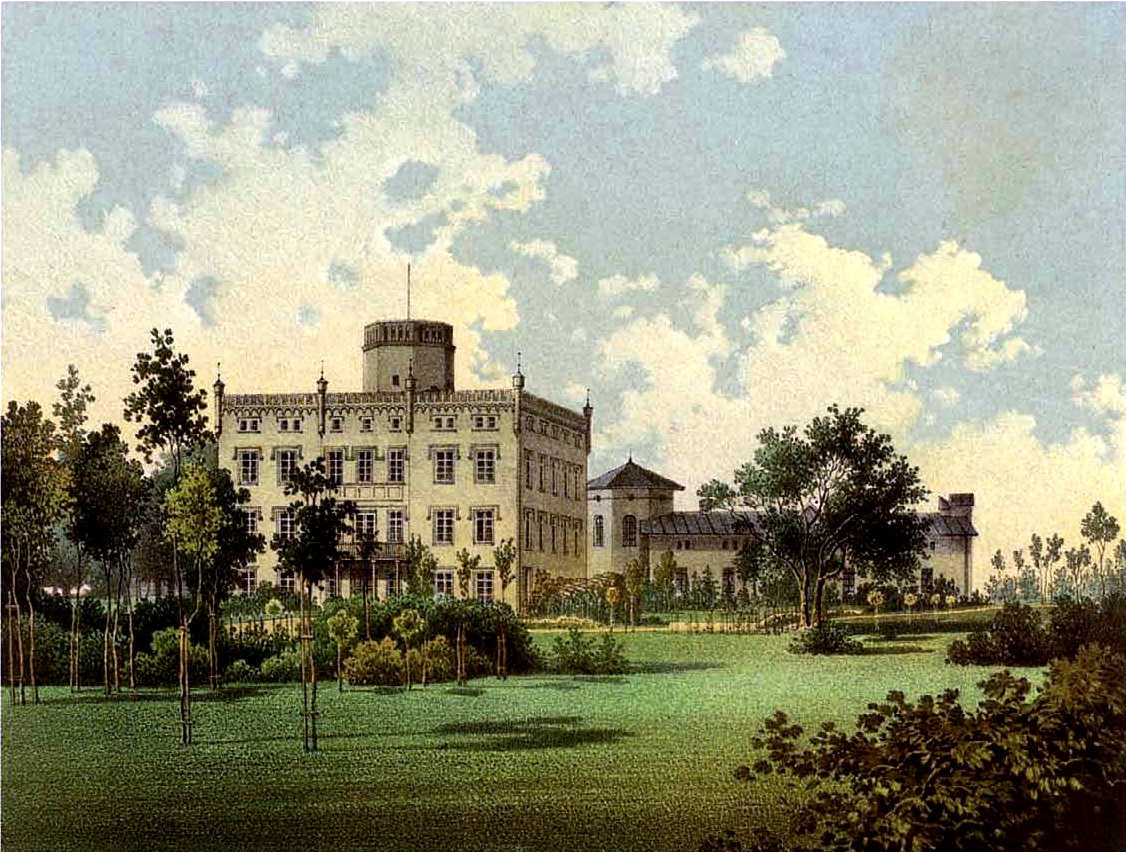 Rittergut Puschine, Kreis Falkenberg, Lithographie von Alexander Duncker, 1869